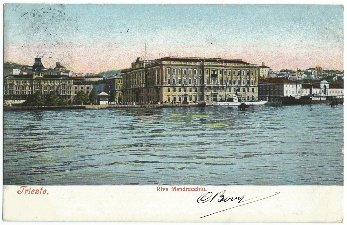 Vue de Trieste au début du XXe siècle.